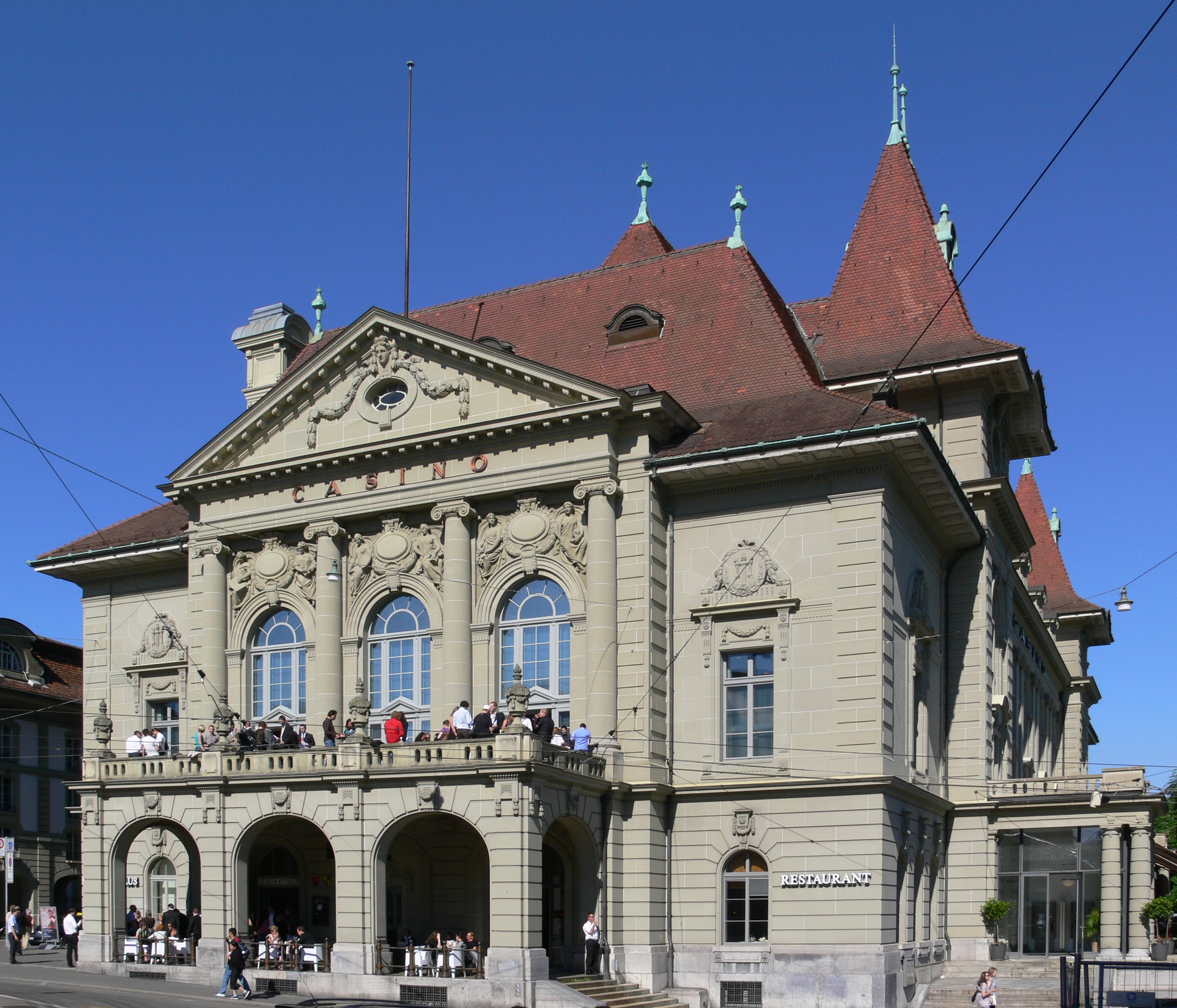 Casino Konzerthaus Bern